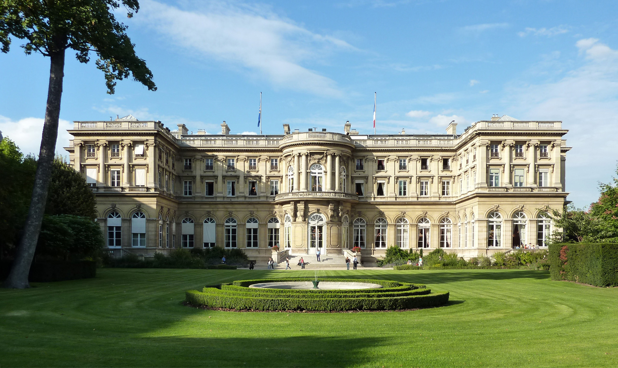 Cour intérieure de l'hôtel du ministre des Affaires étrangères à Paris, quai d'Orsay